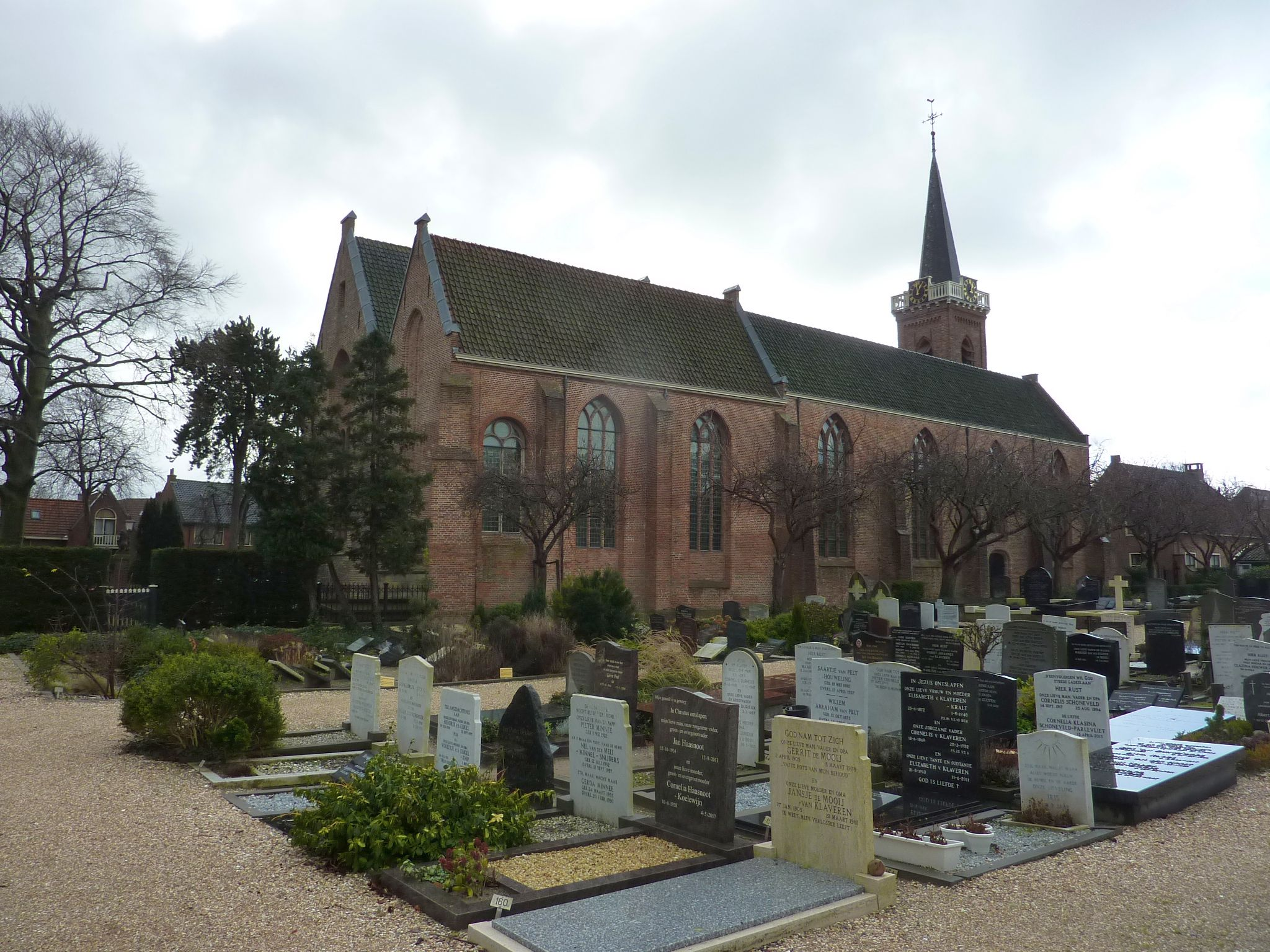 Hervormde Kerk, Katwijk aan den Rijn